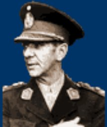 General Eduardo Lonardi. Argentina.